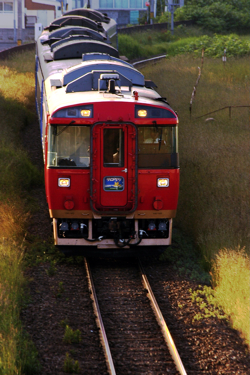 JR hokkaido KI HA 183 "Sarobetsu" carpet car at Minami-Wakkanai station.